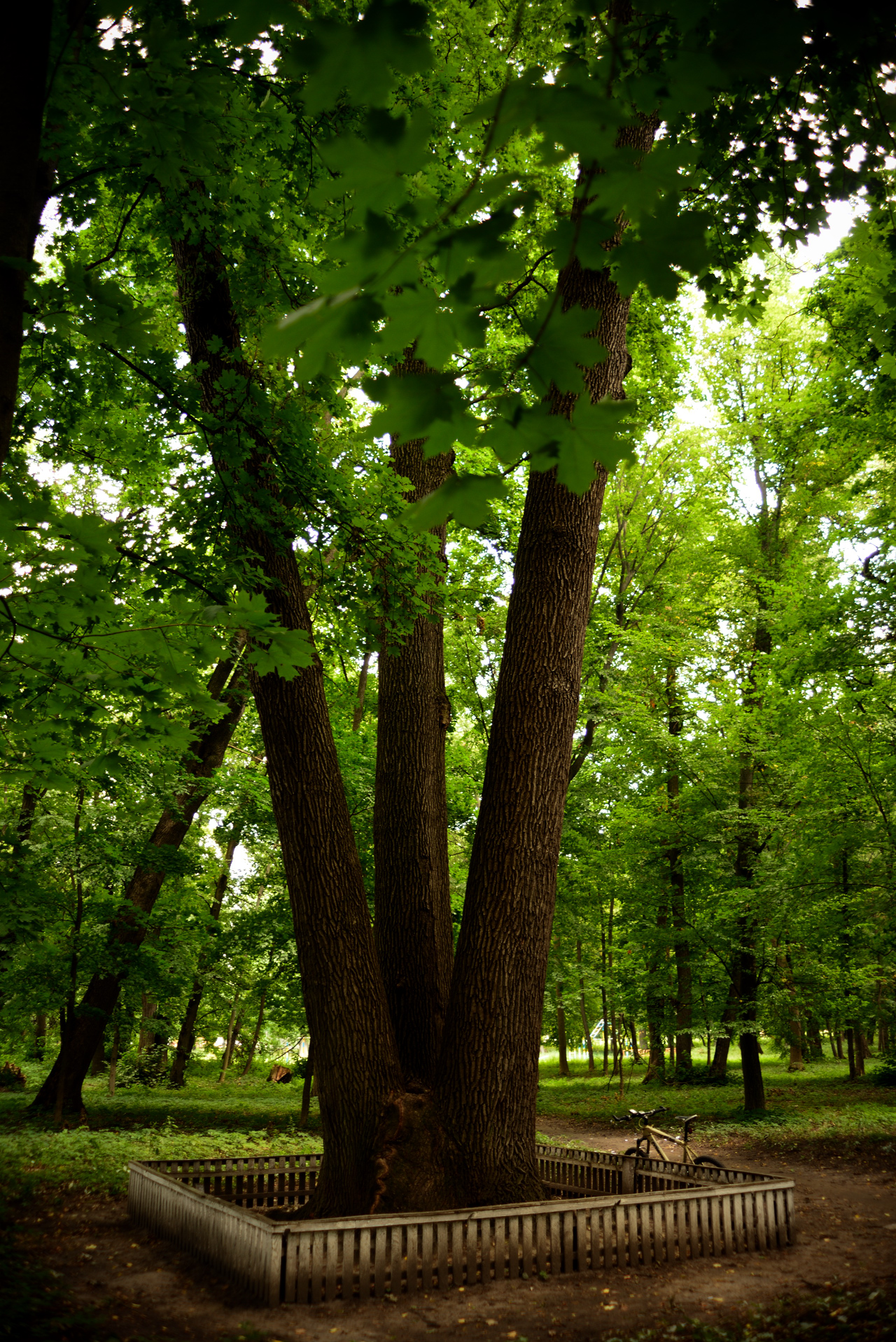 Хомутецький, Миргородський р-н, с. Хомутець